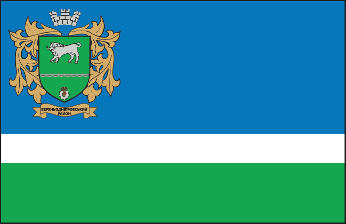 Прапор Верхньодніпровського району Дніпропетровської області.